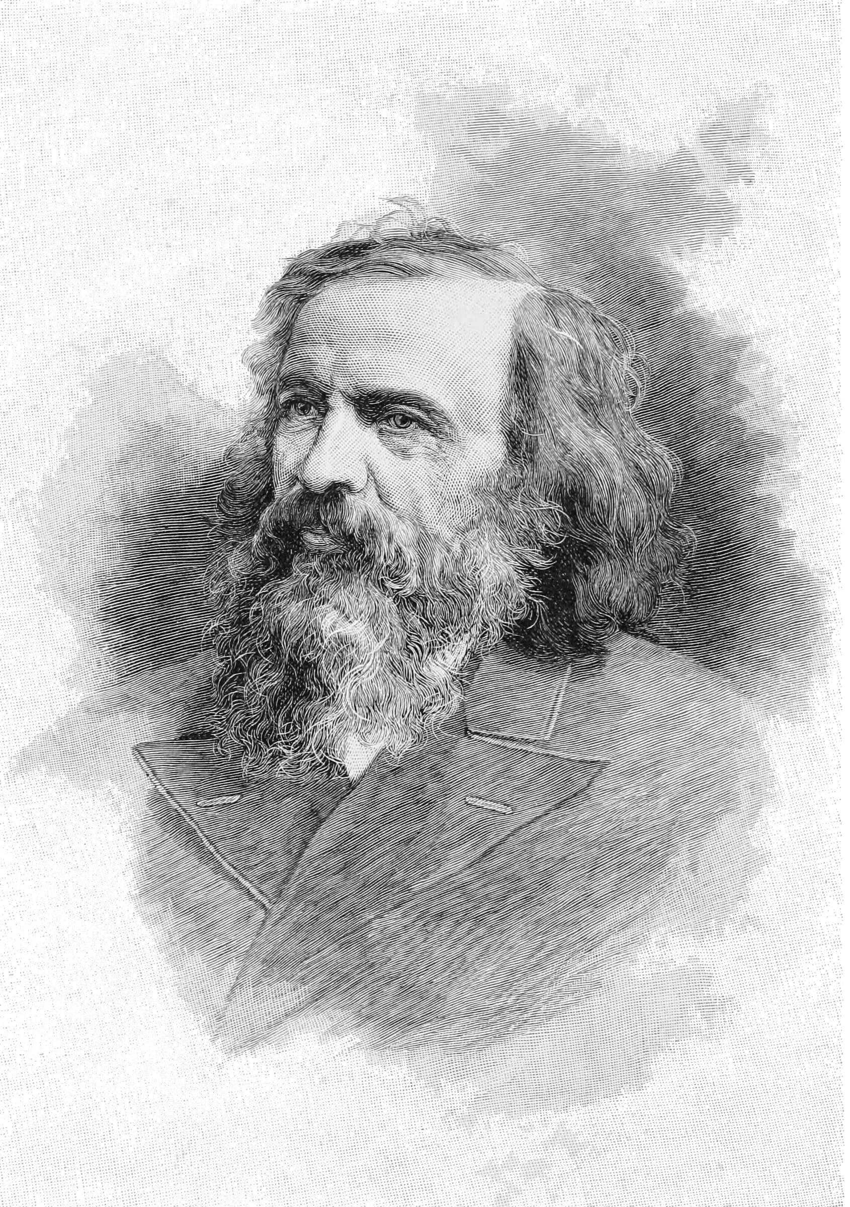 Dmitri Ivanowitsh Mendeleeff